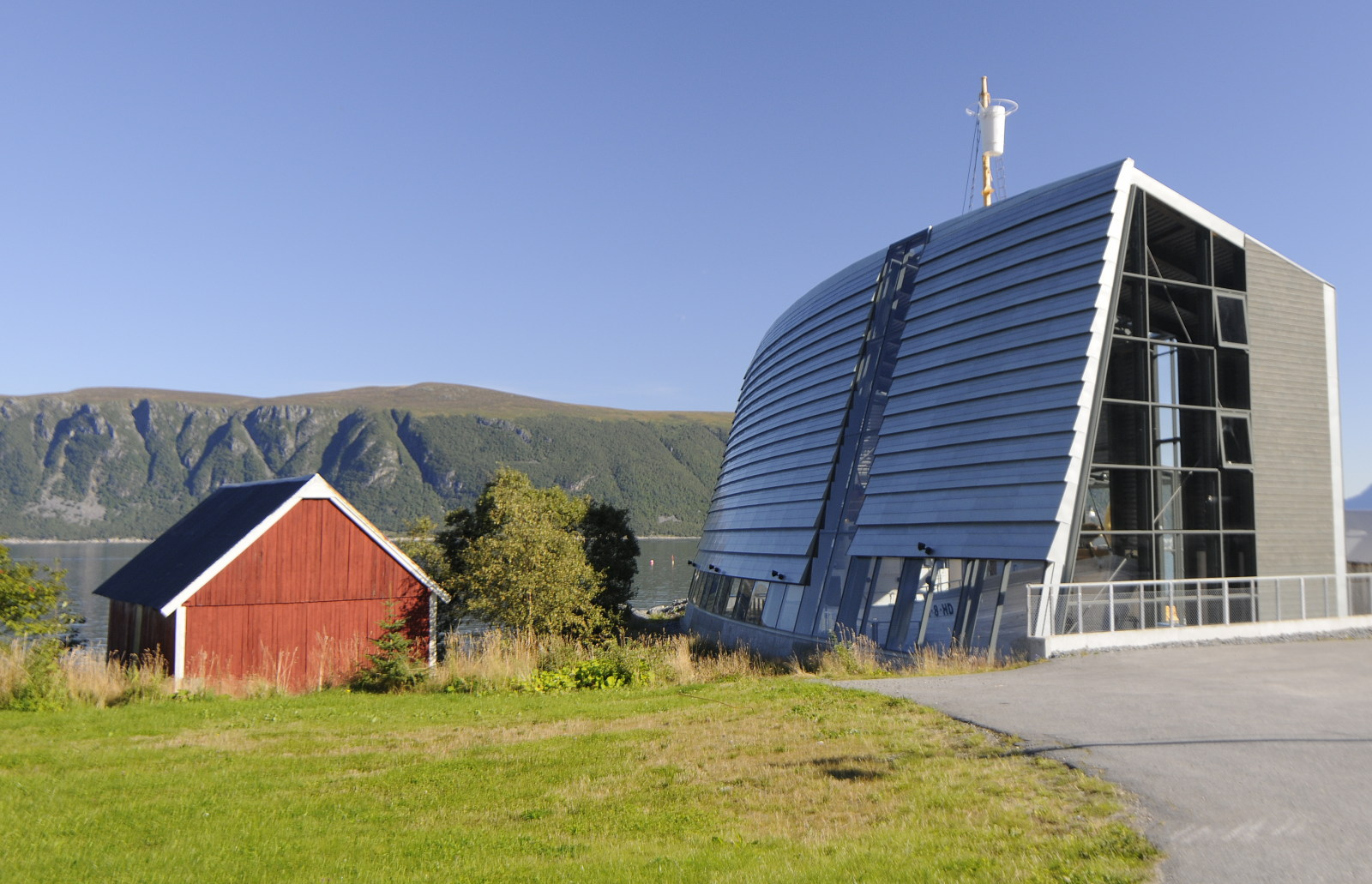 Ishavsmuseet Aarvak (opprettet 1981 i Brandal i Hareid kommune) er en stiftelse for å dokumentere norsk polarhistorie (sjøfart, forskning og fangst), og i dag en del av Sunnmøre Museum. Det er ett av få offentlige polarmuseum sør for Polarmuseet i Tromsø.